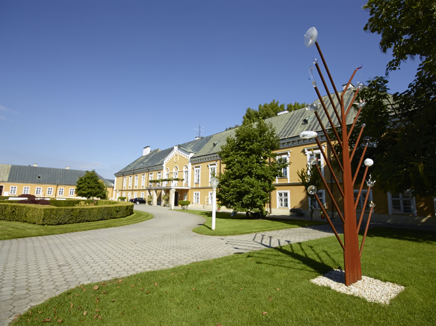 Zámok Lednické Rovne, bývalé sídlo zakladateľov sklárne